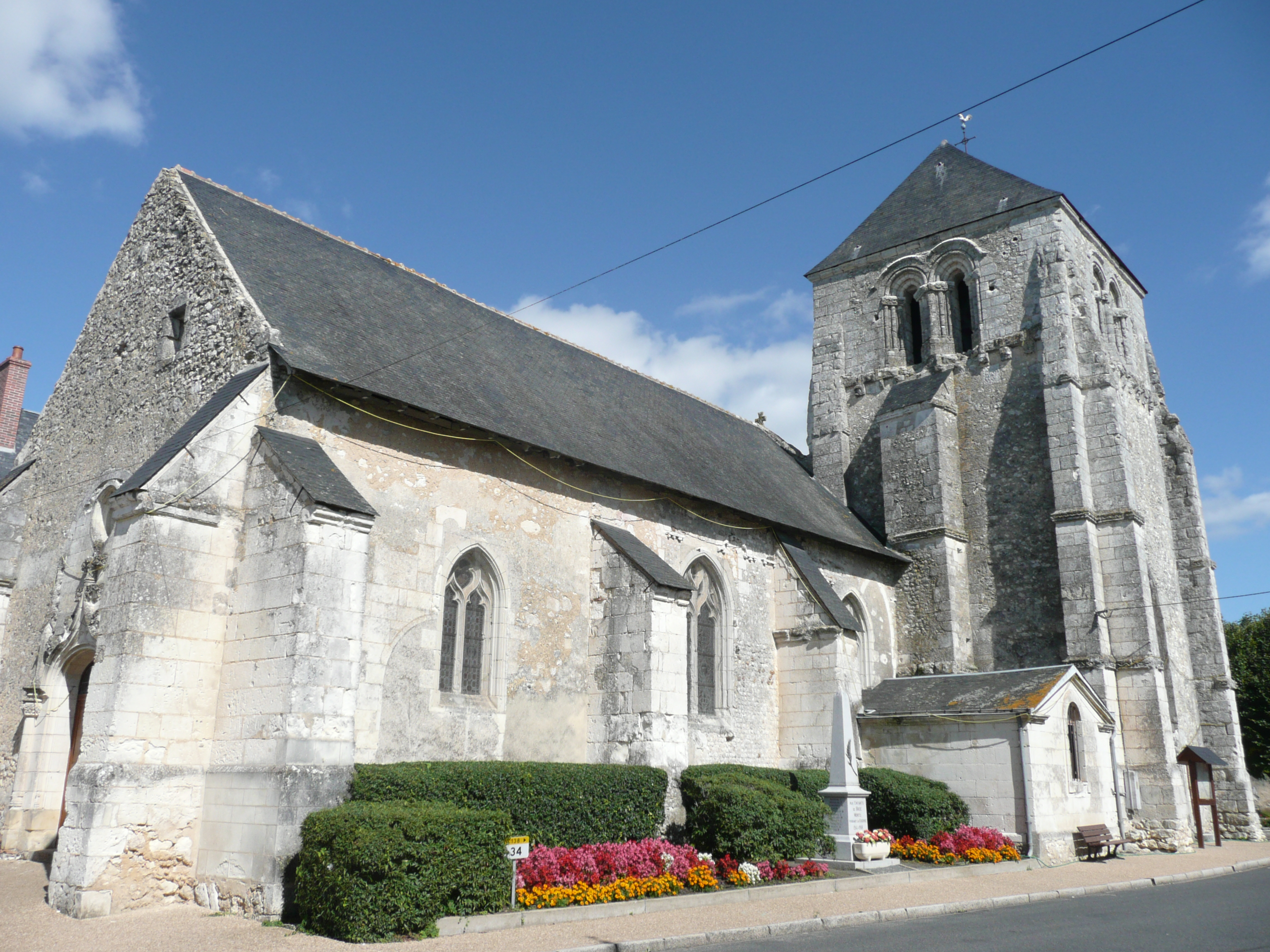 Broc - Eglise This building is en partie classé, en partie inscrit au titre des Monuments Historiques. .